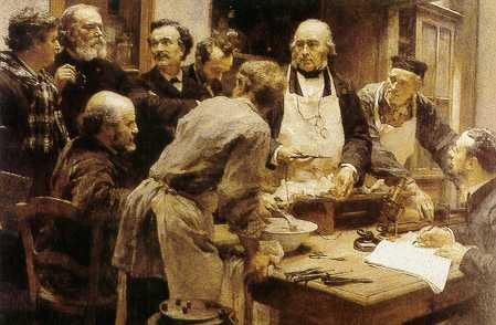 Claude Bernard Lesson